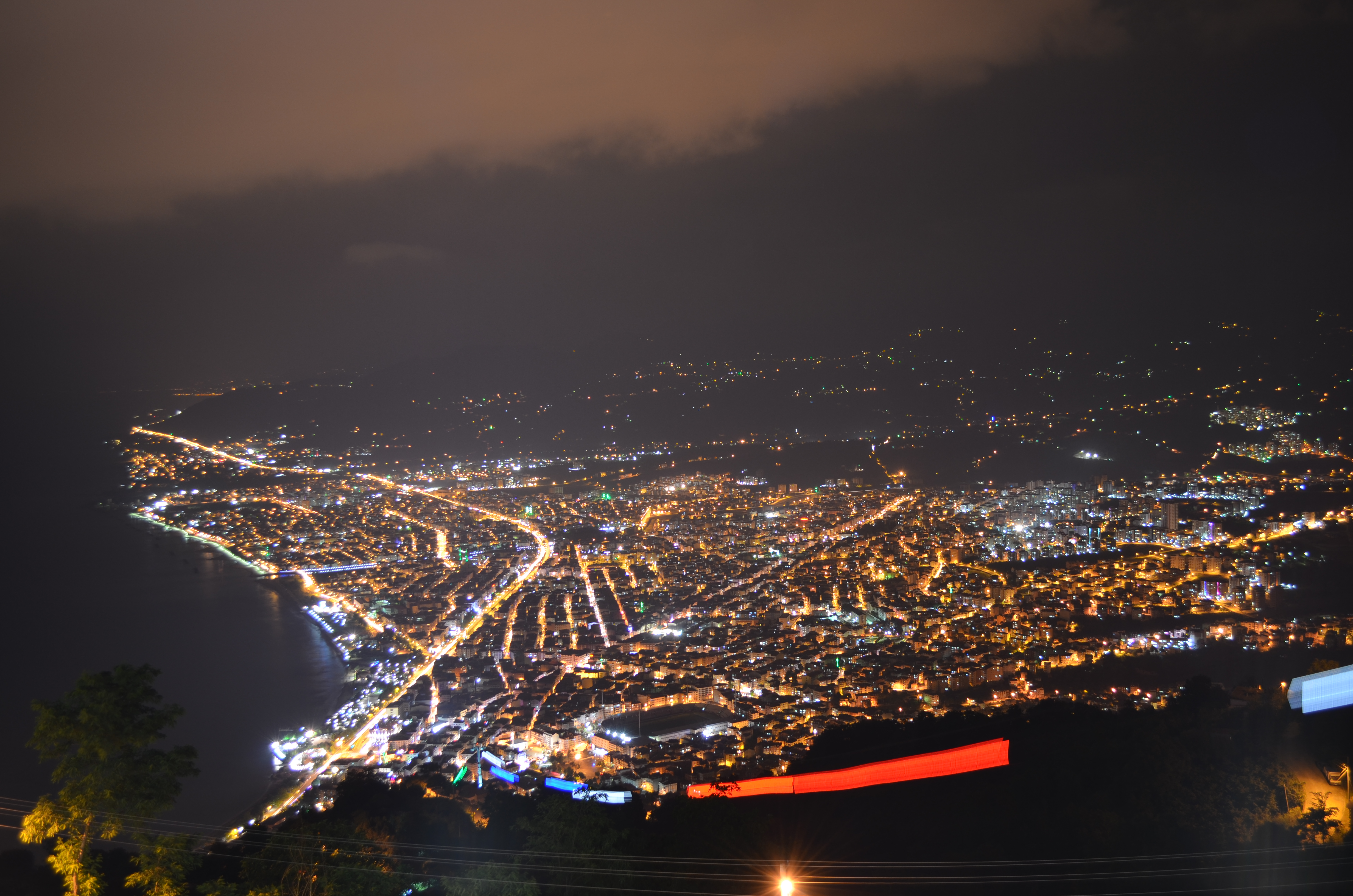 Ordu